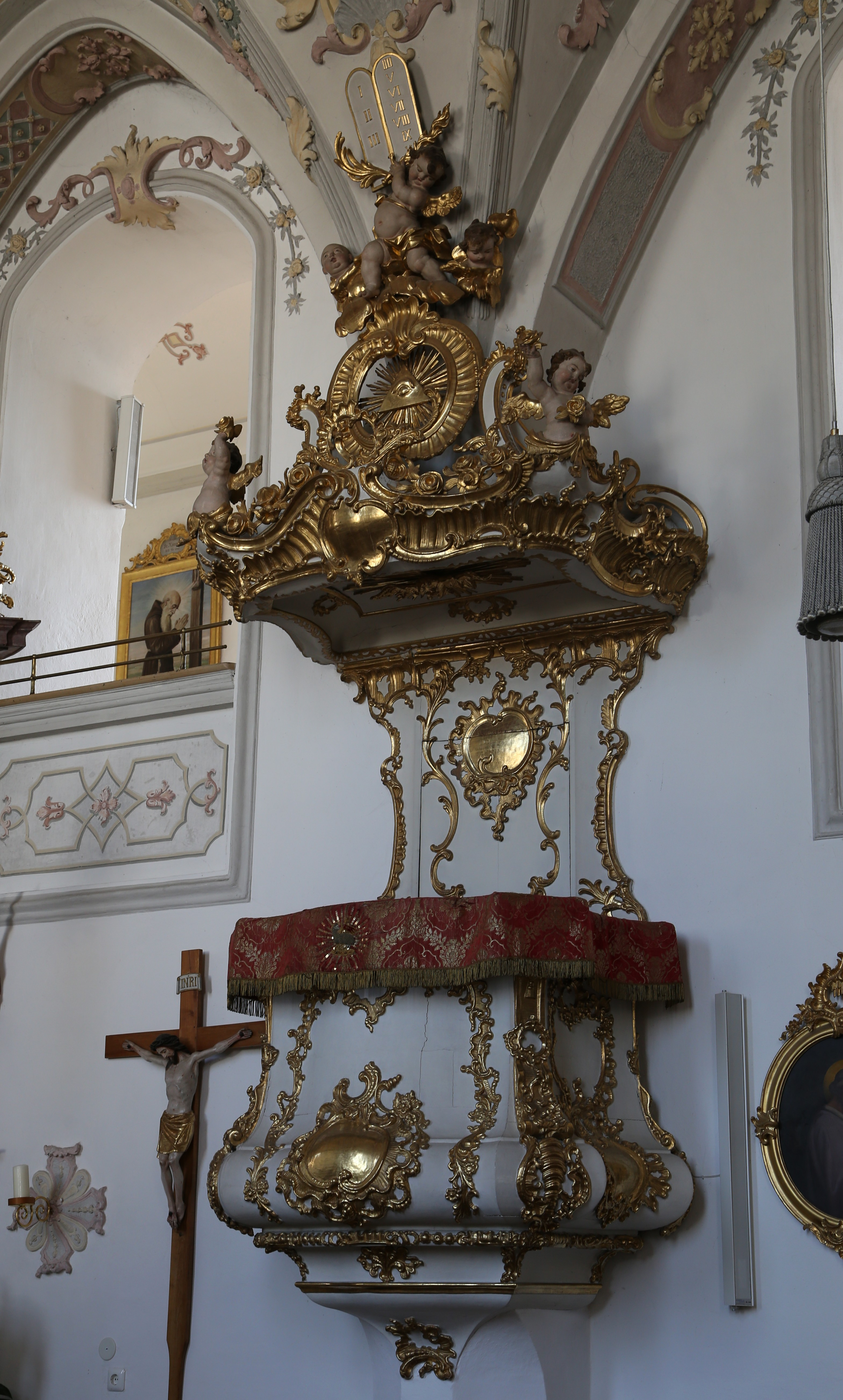 Kirchplatz 2, Höslwang; Kath. Pfarrkirche St. Nikolaus, Saalbau mit Satteldach, Nordturm mit Zwiebel, eingezogenem Chor und südlichem doppelstöckigen Anbau als Oratoriengang (Antoniuskapelle von 1693), spätgotisch, im Kern 15. Jh., barocker Ausbau 1734 durch Martin Pöllner, 1740 Turmoberbau, 1922 Verlängerung mit baulicher Verbindung zum westlichen Pfarrhof; mit Ausstattung.